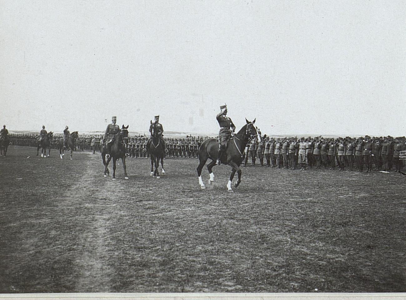 Parade, Abschreiten der Front durch Generaloberst Kirchbach